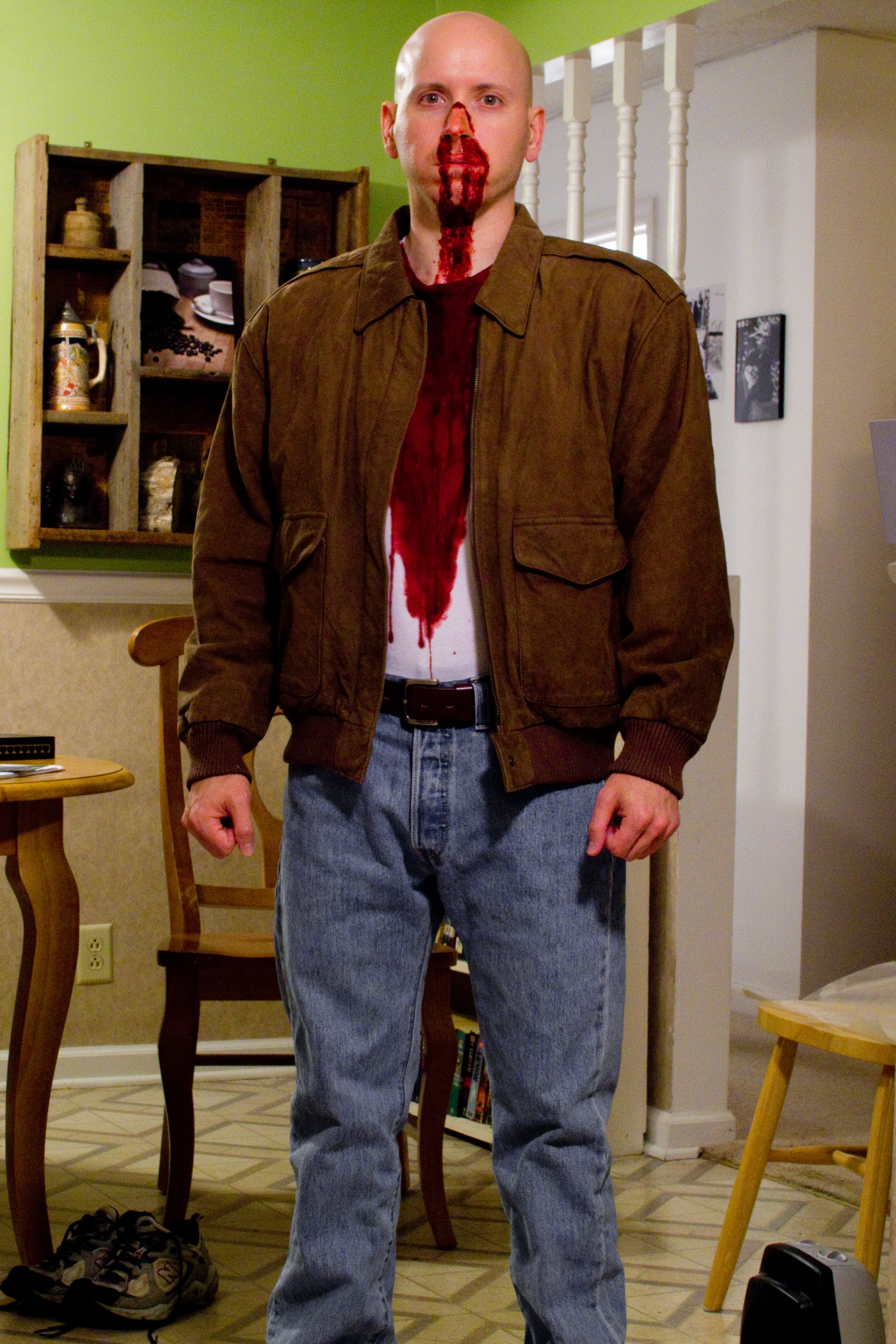 Parodie du personnage de Butch Coolidge dans le film Pulp Fiction.